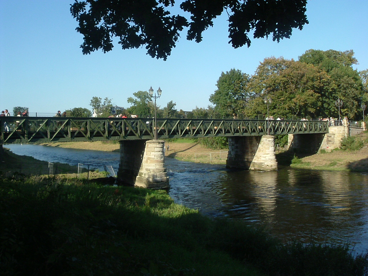 Untermhäuser Brücke, Gera, Deutschland/Germany